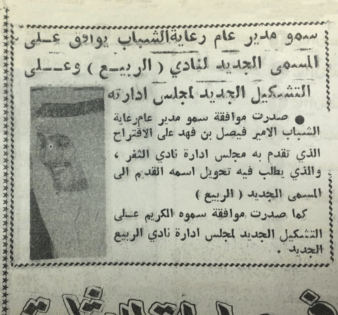 قرار تغيير مسمى الثغر الى الربيع 1393هـ الموافق 1973م